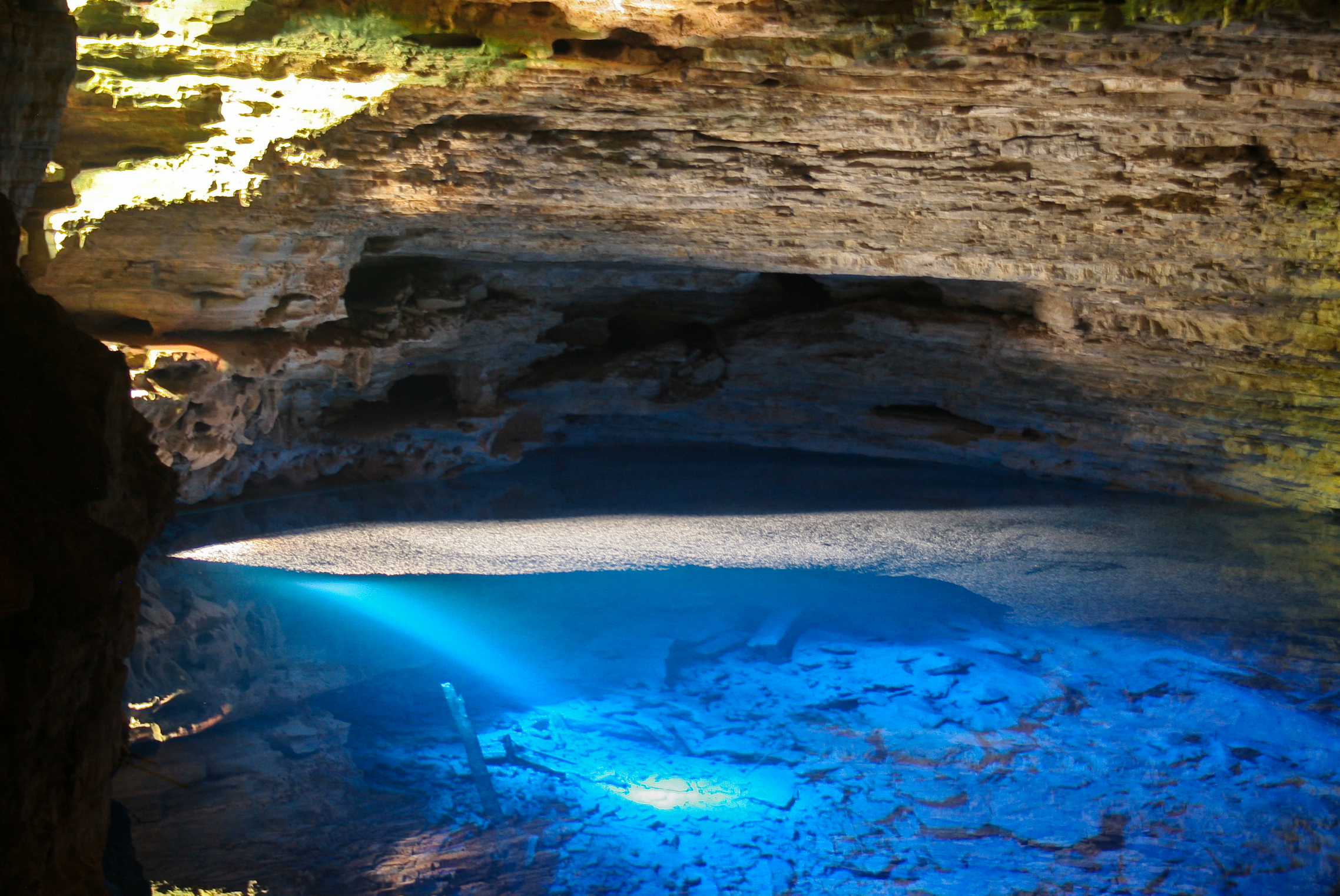 Parque Nacional da Chapada Diamantina - Bahia - Brasil